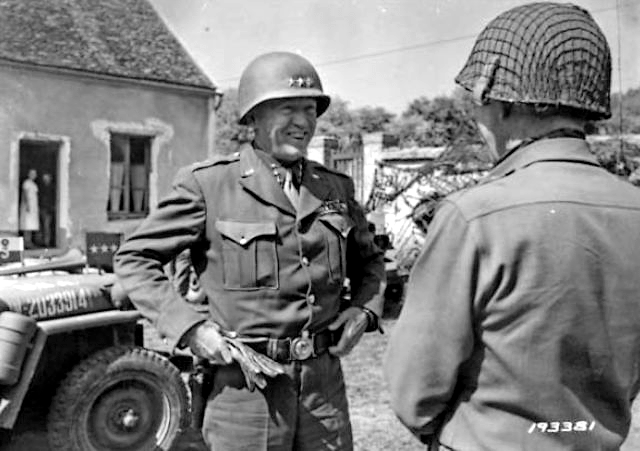 Un sonriente Patton junto al Mayor General Leroy Irwin de la 5ª División de Infantería durante el cruce del río Sena en Fontainebleau, al sur de París. 25 de agosto de 1944